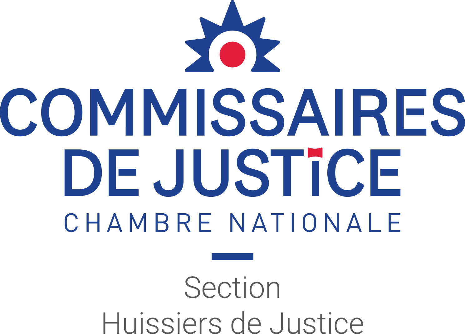 Logo de la section professionnelle des huissiers de justice de la Chambre nationale des commissaires de justice.